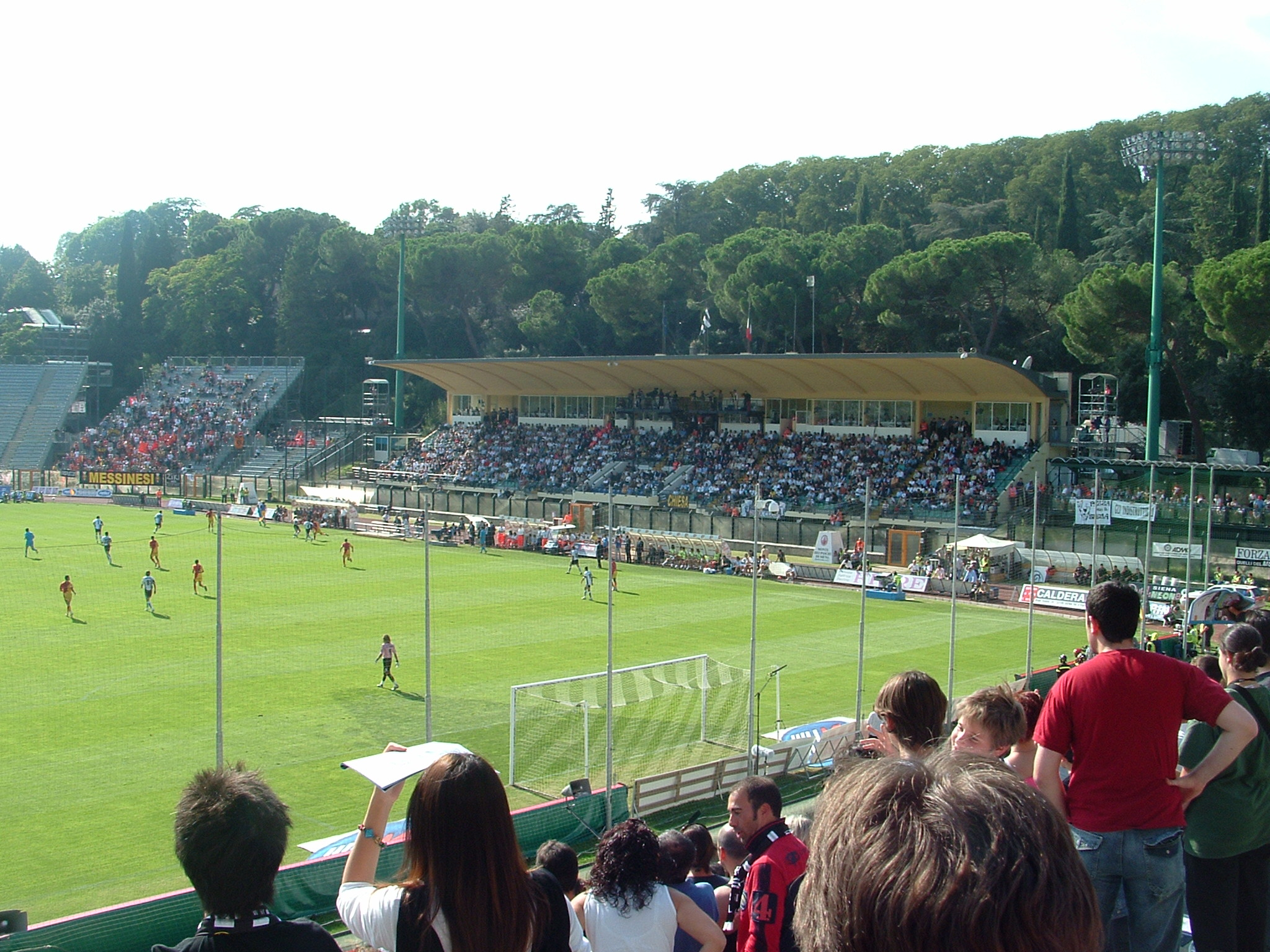 Stadium of Siena, Stadio Artemio Franchi, Main Stand